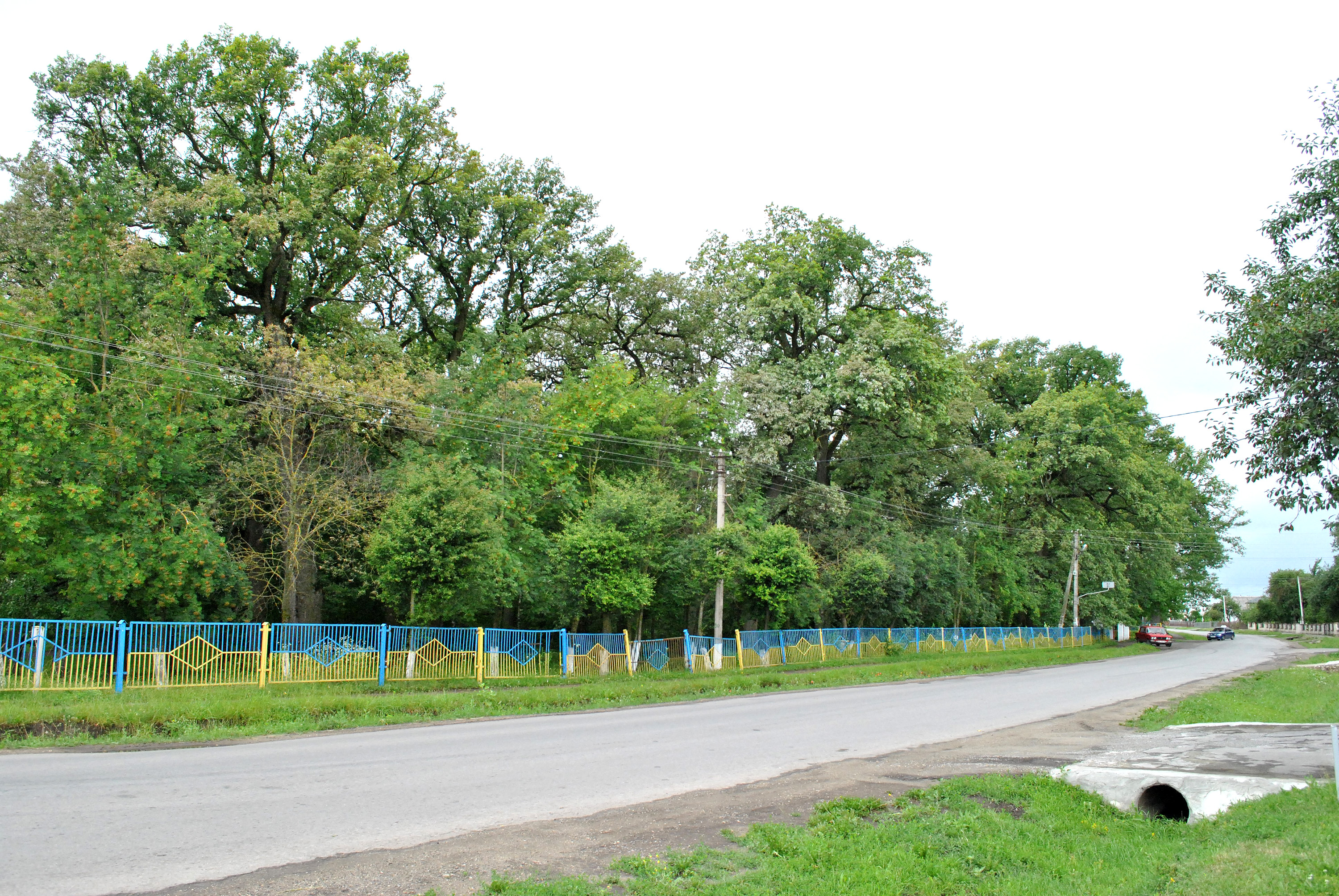 «Гай Кобзаря» в с. Великі Гаї Тернопільського району Тернопільської області.